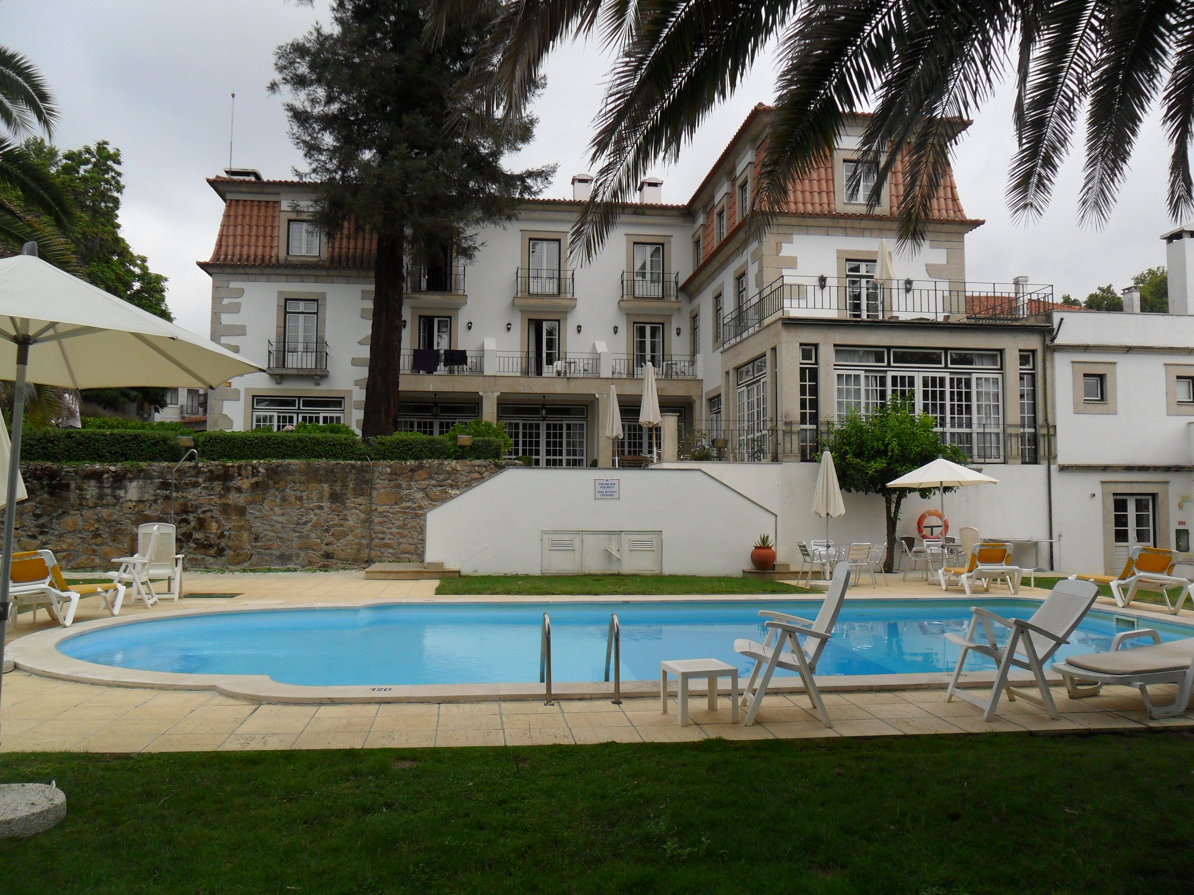 áreas de lazer This file was uploaded for Wiki Loves Monuments in Portugal with the unique identifier 97013975.